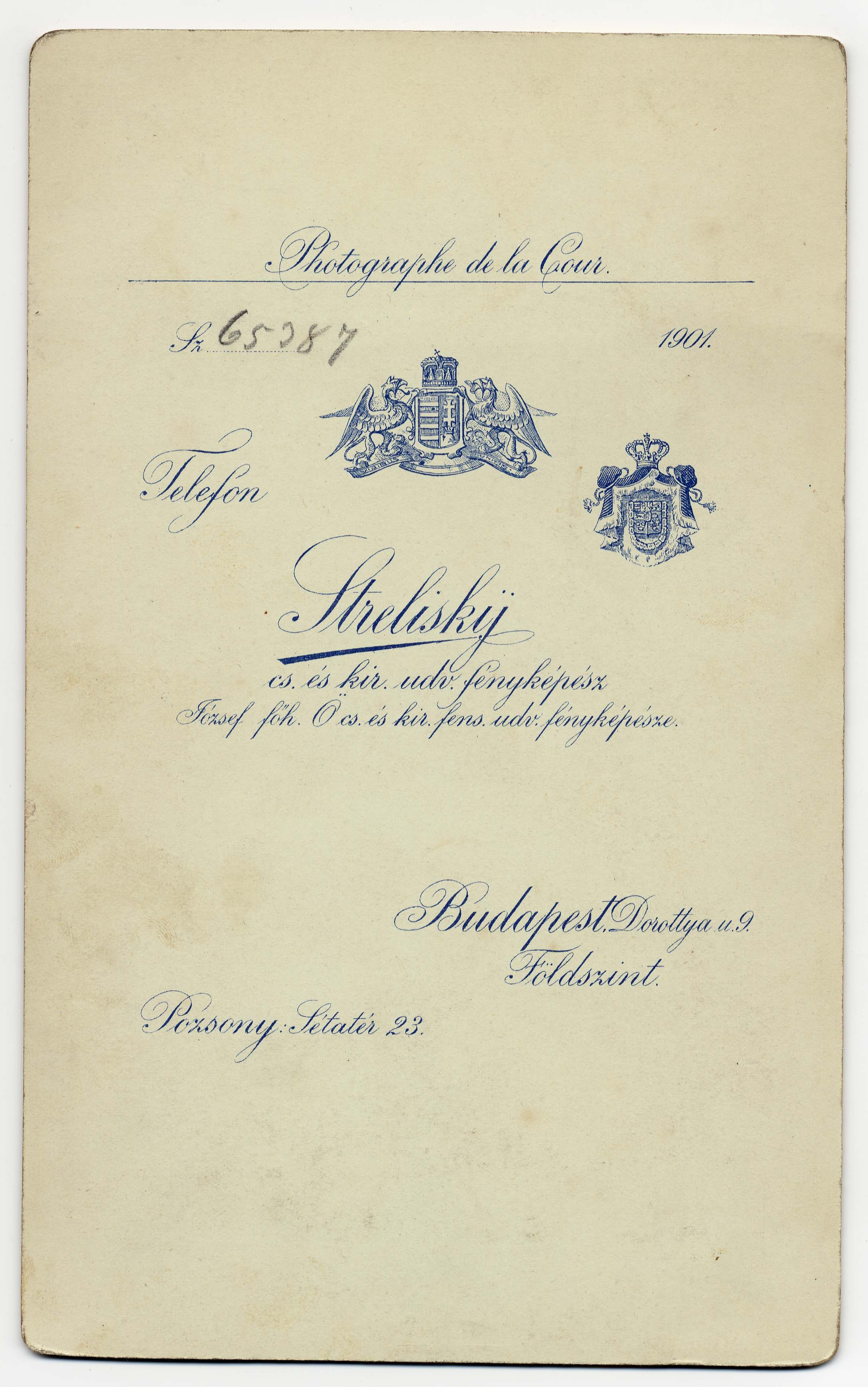 Aggházy Károly fotójának hátoldala Strelisky Lipót felvételén